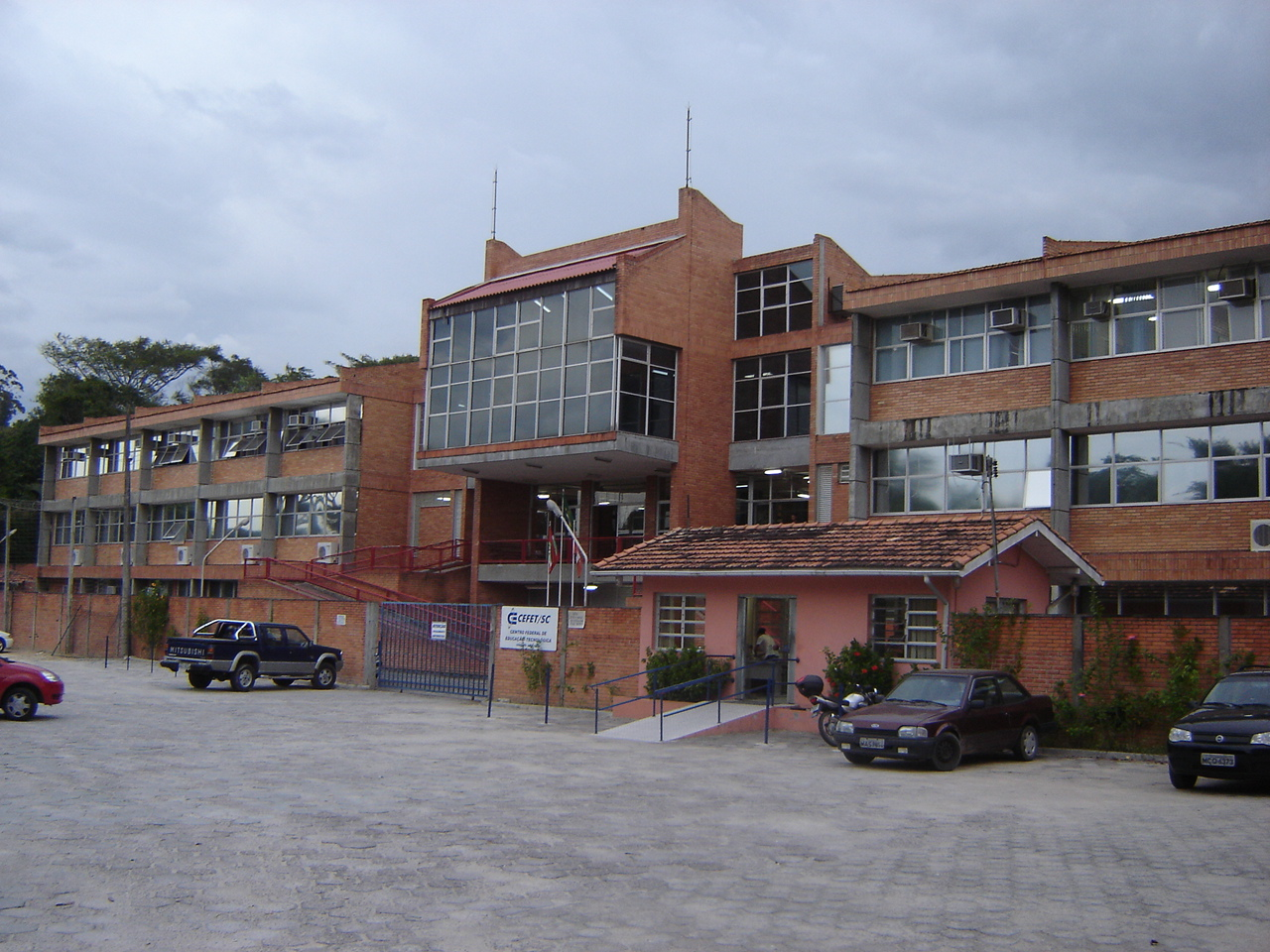 Fachada da Unidade São José do Centro Federal de Educação Tecnológica de Santa Catarina (CEFET-SC), em São José (SC), Brasil.